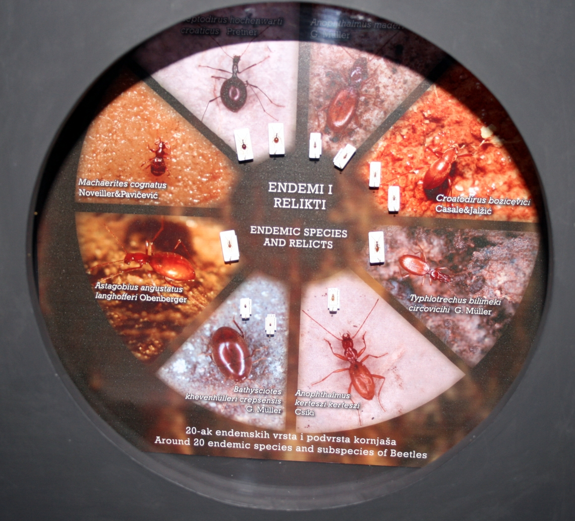 Kukci riječkog područja u Prirodoslovnom muzeju Rijeka